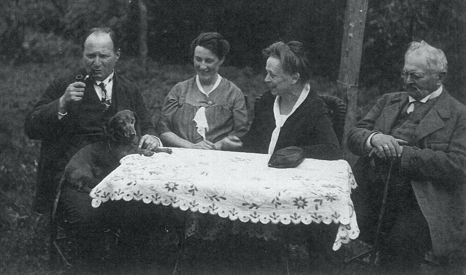 von links: Walter Zaeschmar (* 1884); Walters Ehefrau Margarete; Georgs Ehefrau Marie, geborene John (1860-1947); Georg Zaeschmar (1852-1932)